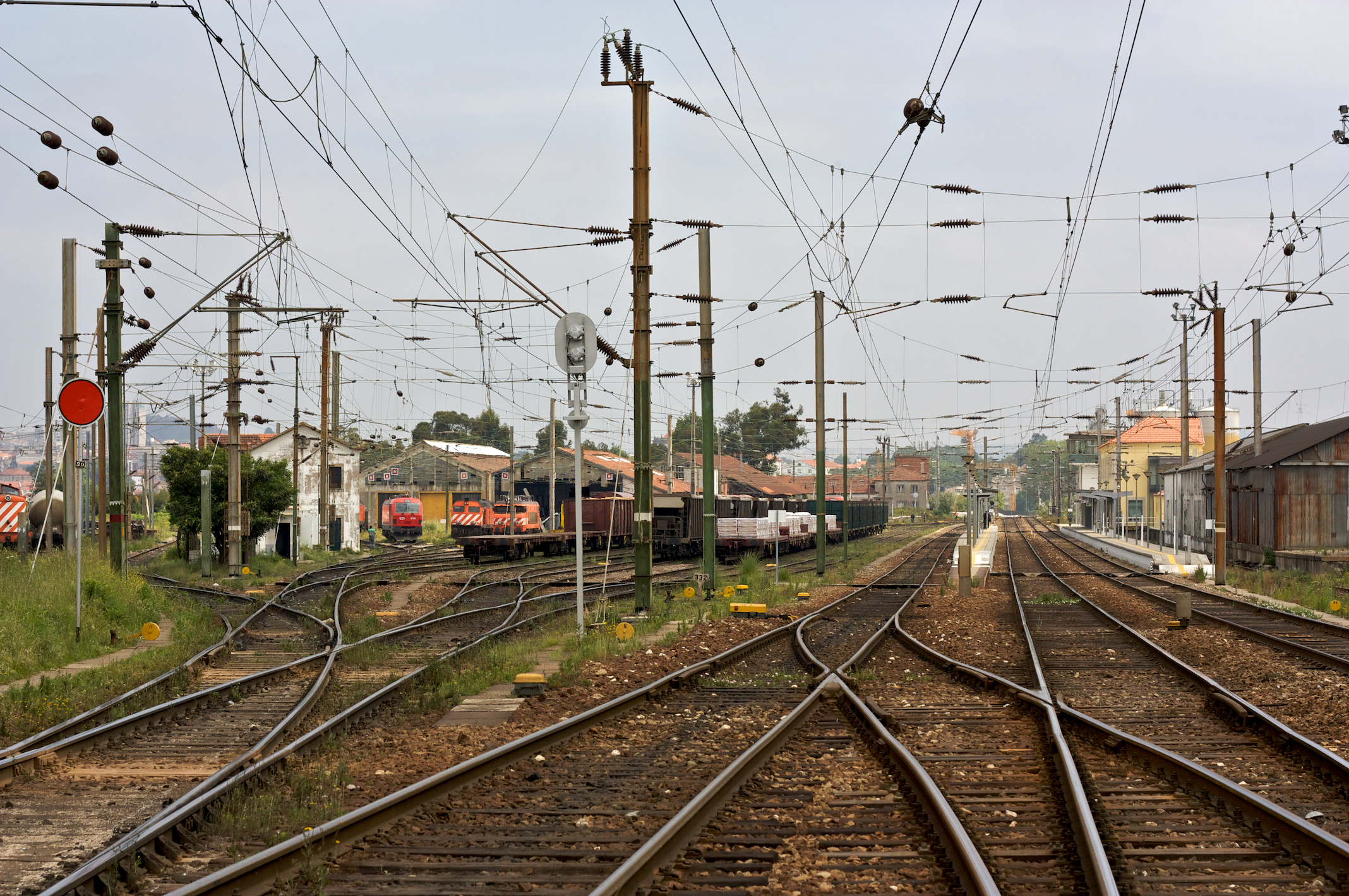 Tipo: E [Estação] Local: Vila Nova de Gaia [Linha do Norte, PK 332] Data e hora: 7 de Maio de 2009 [12h17]